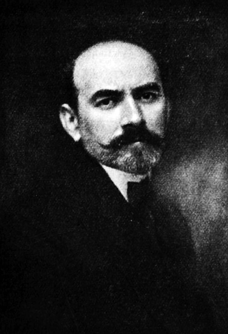 Portreto de Leo Belmont, ĉ. 1910